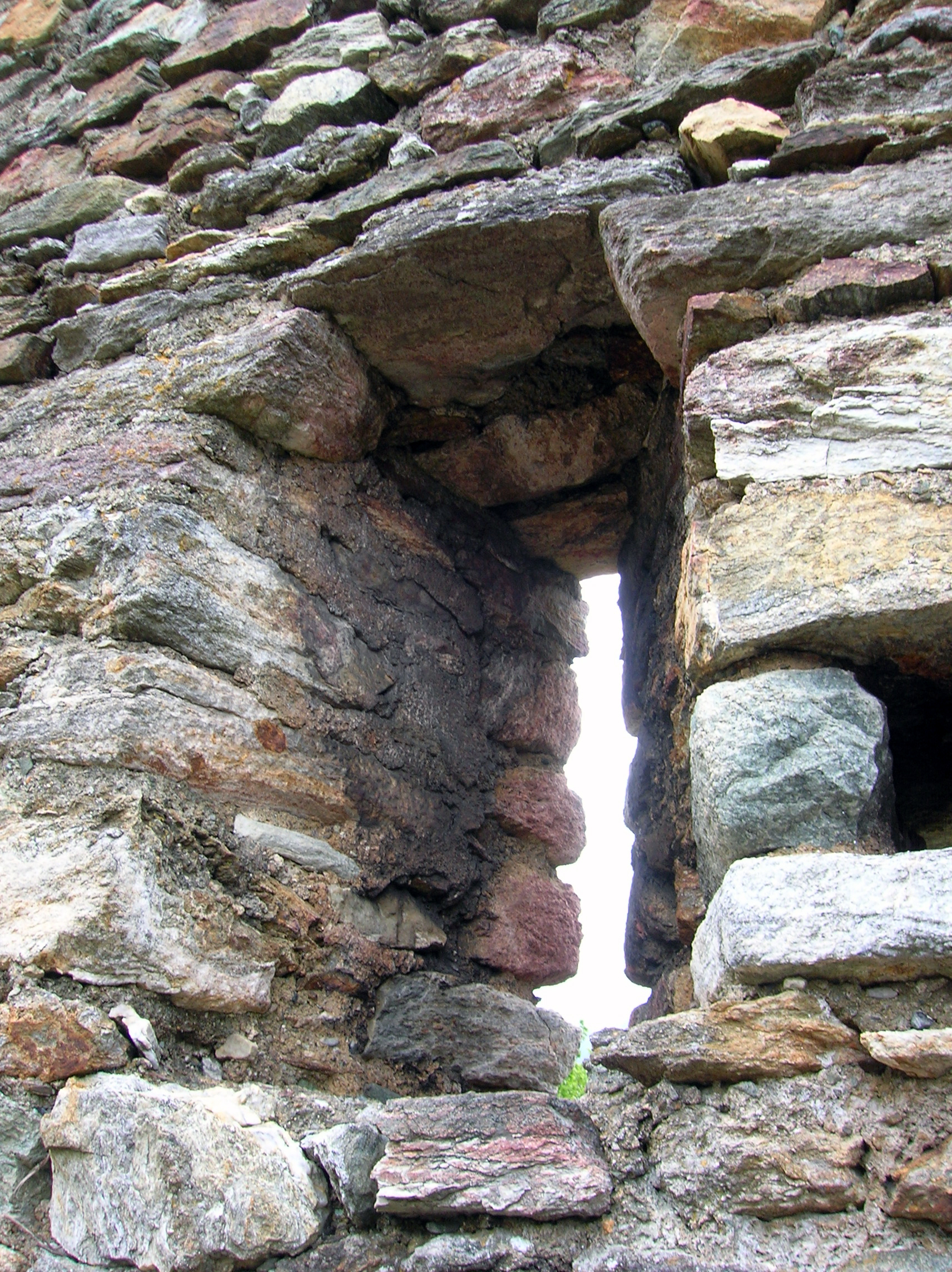 Castello di Suzey, loc. Ivéry, Pont-Saint-Martin, Valle d'Aosta, Italia.